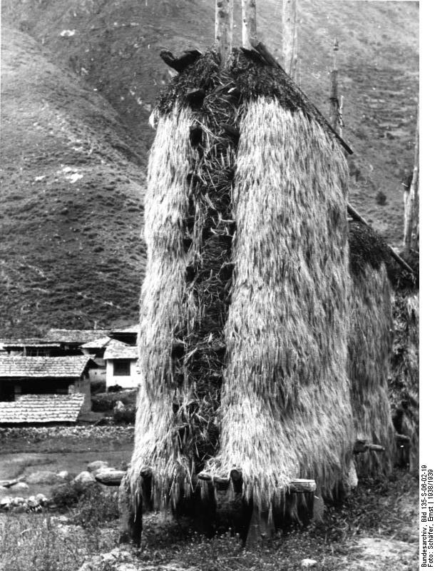 Mittleres Tschumbital [Chumbital], tibetische Siedlung mit Getreidetrockengerüst